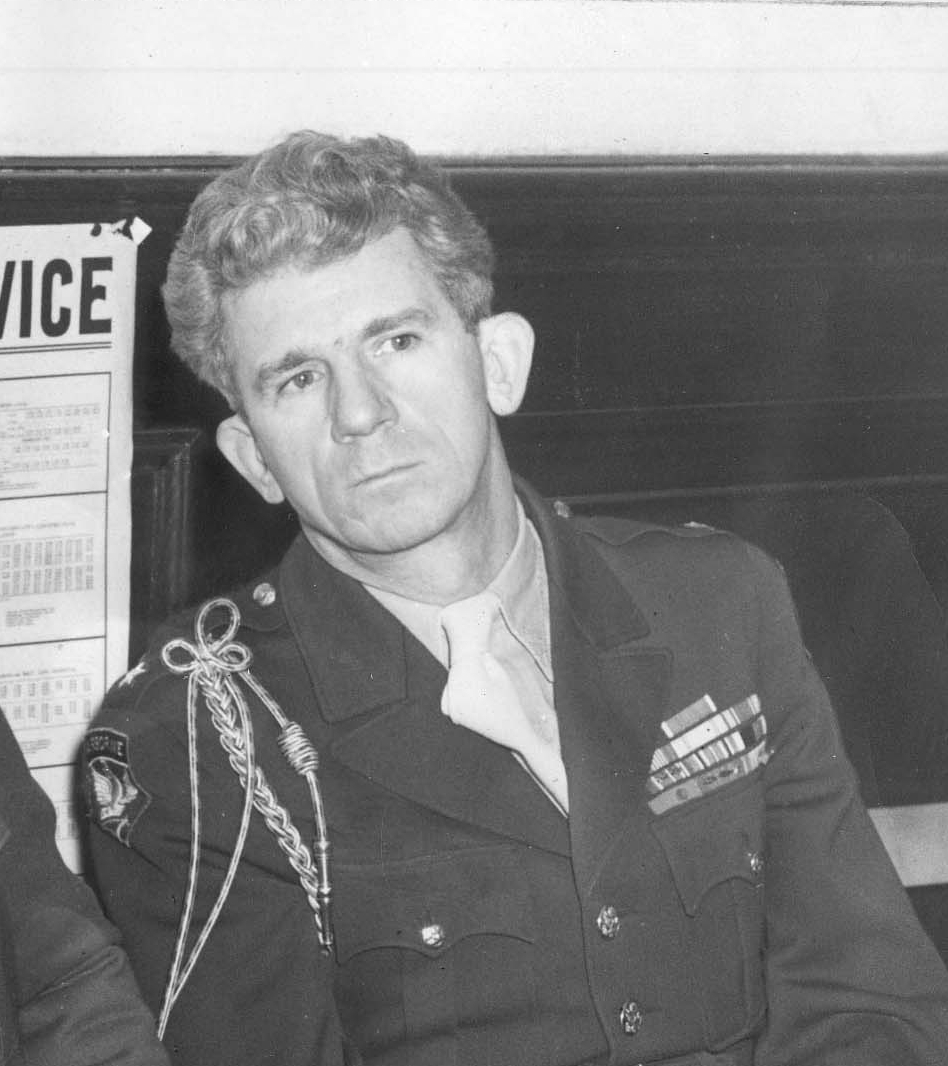 Frank L. Howley 1948 Amerikanischer Stadtkommandant von Berlin